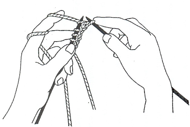 cs/Rucni pleteni se dvema jehlami